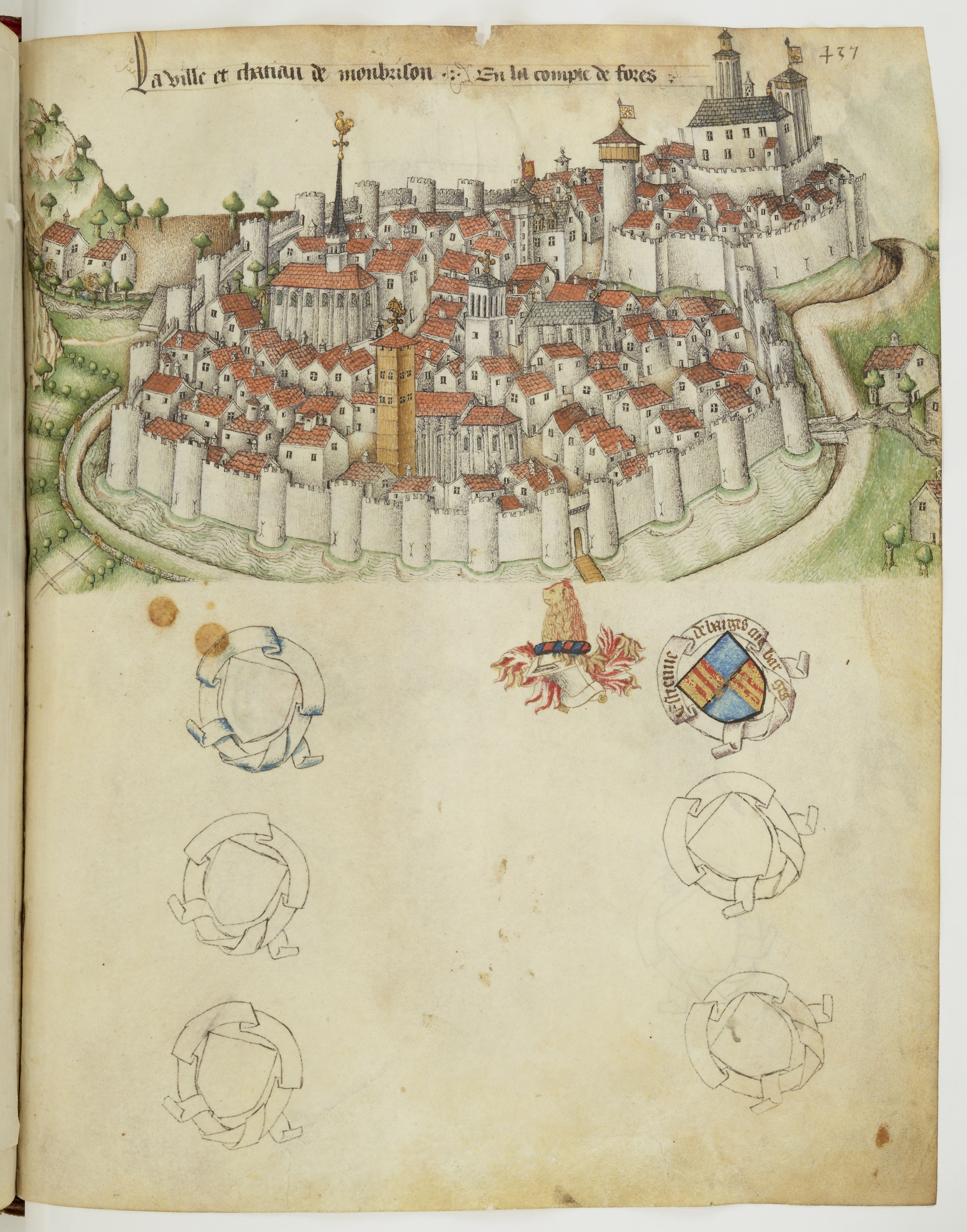 La ville et le château de Montbrison dans le Registre d'armes » ou armorial d'Auvergne, dédié par le hérault Guillaume REVEL au roi Charles VII. 1401-1500.